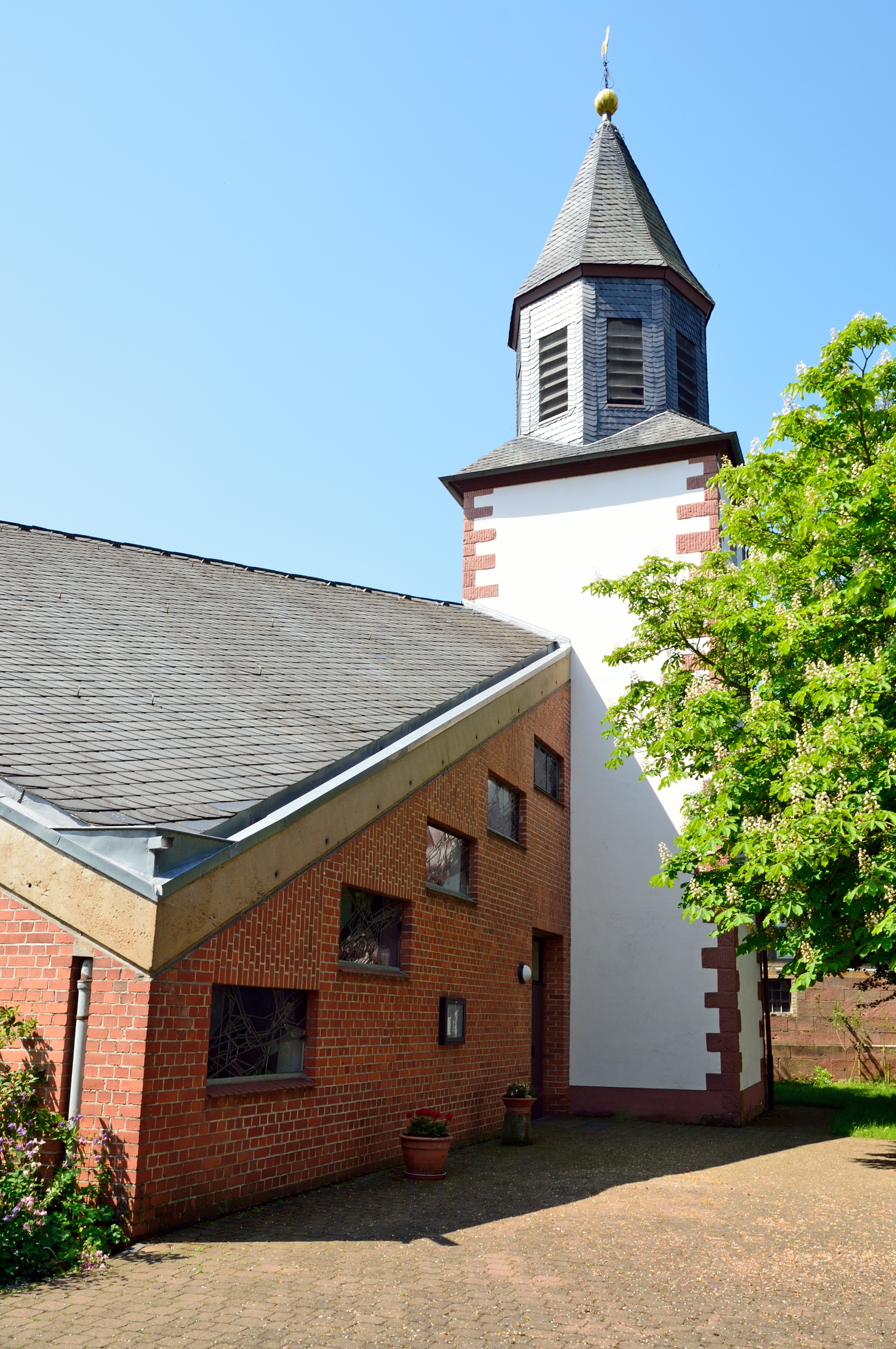 Bartholomäuskirche Beltershausen